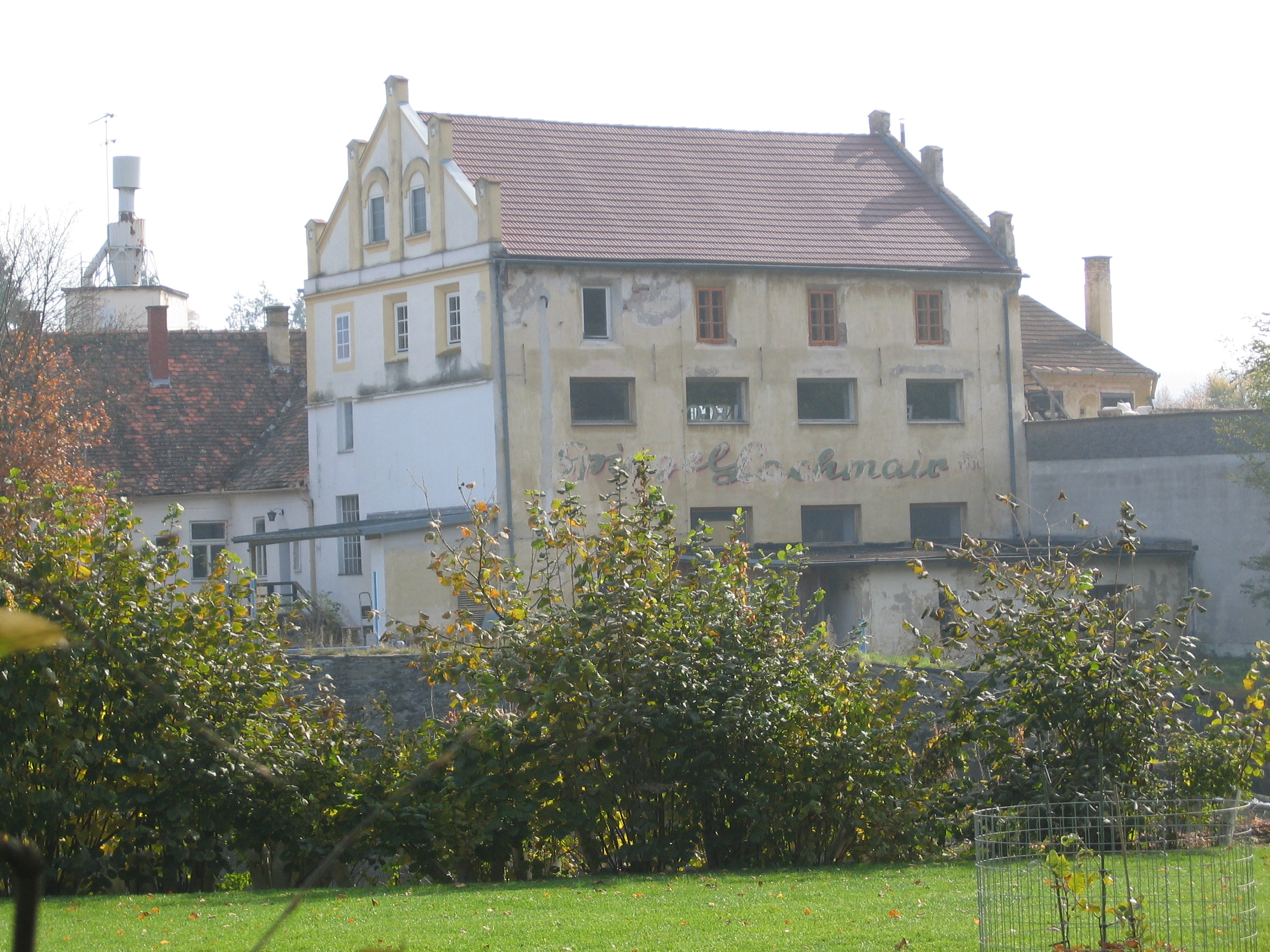 Die frühere Manigfallmühle (heutige Schreibweise, obwohl oft auch Mannigfallmühle), wo 1912 die angehende Schriftstellerin Friderike Winternitz vier Monate gelebt hat und von wo aus sie mit einem Brief so erfolgreich mit Stefan Zweig angebandelt hat, dass sie ein paar Monate später seine Geliebte und spätere Ehefrau wurde (siehe Andreas Weigel: Literarische Spurensuche in Gars-Thunau. Was Karl Kraus, Heimito von Doderer und Stefan Zweig mit der Sommerfrische im Kamptal verbindet).